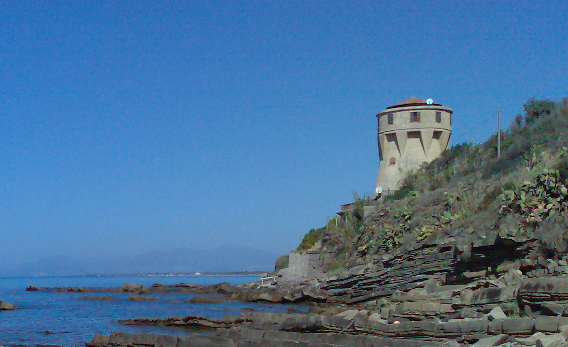 Carlo Iannuzzi, Opera Propria, Agropoli - Torre S. Marco, GFDL e Creative Commons CC-BY-SA tutte le versioni (3.0, 2.5, 2.0 e 1.0), sono l'autore